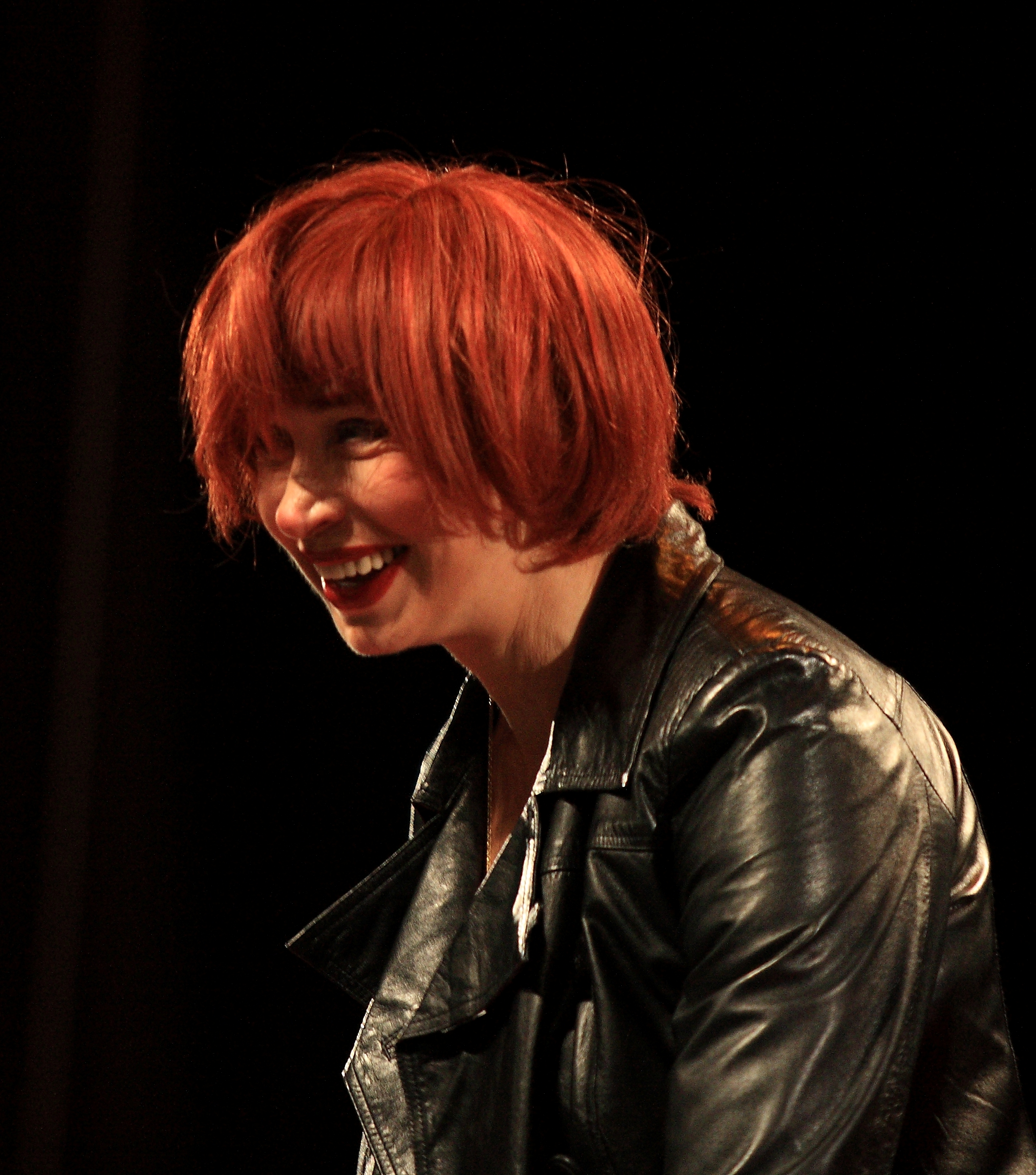 Татьяна Григорьевна Васильева - советская и российская актриса театра и кино, народная артистка России в роли Анастасии в спектакле «Белла Чао»!